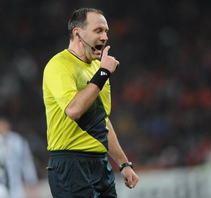 Jonas Eriksson Arbitro Svedese Il Match Shakthar Donestk - Juventus